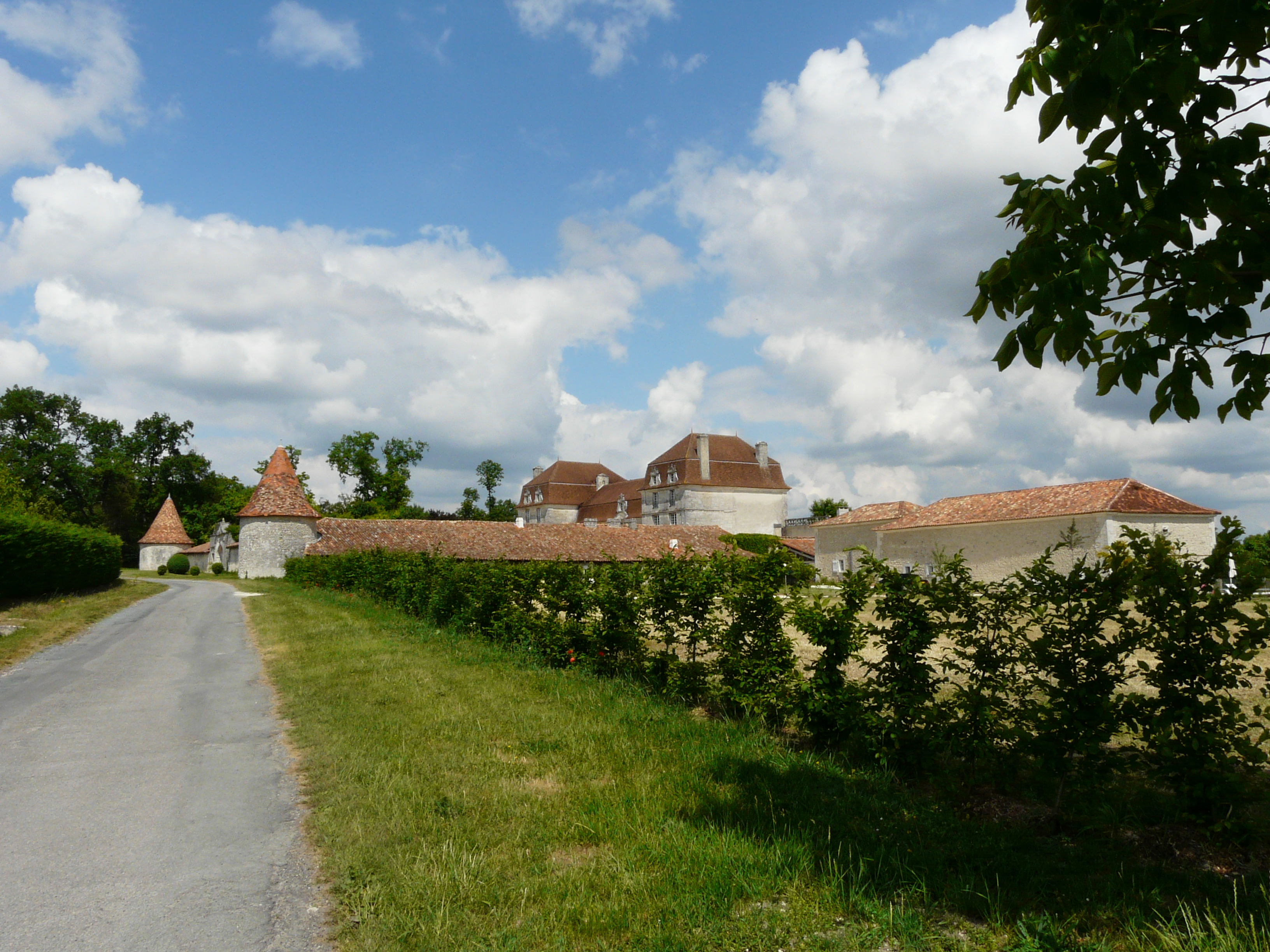 Le château de Clauzuroux et ses dépendances, vus depuis le sud-ouest, Champagne-et-Fontaine, Dordogne, France.